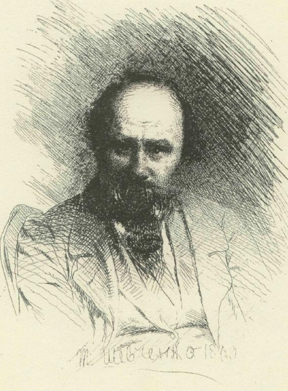 Self-portrait